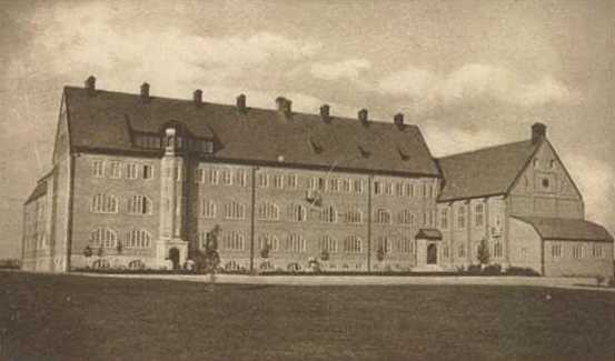 "Uppsala, Folkskoleseminariet"